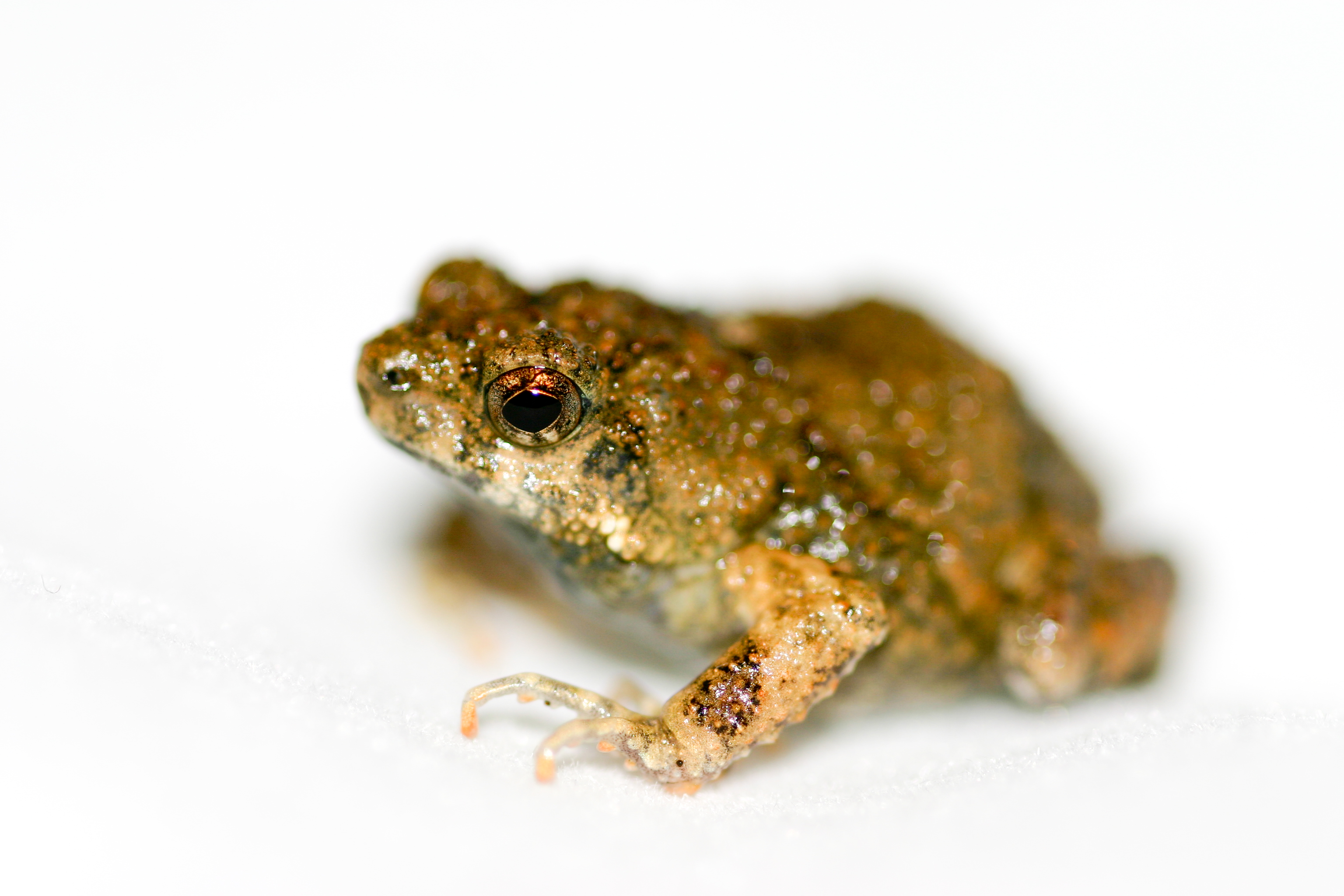 tungara frog (Physalaemus pustulosus)